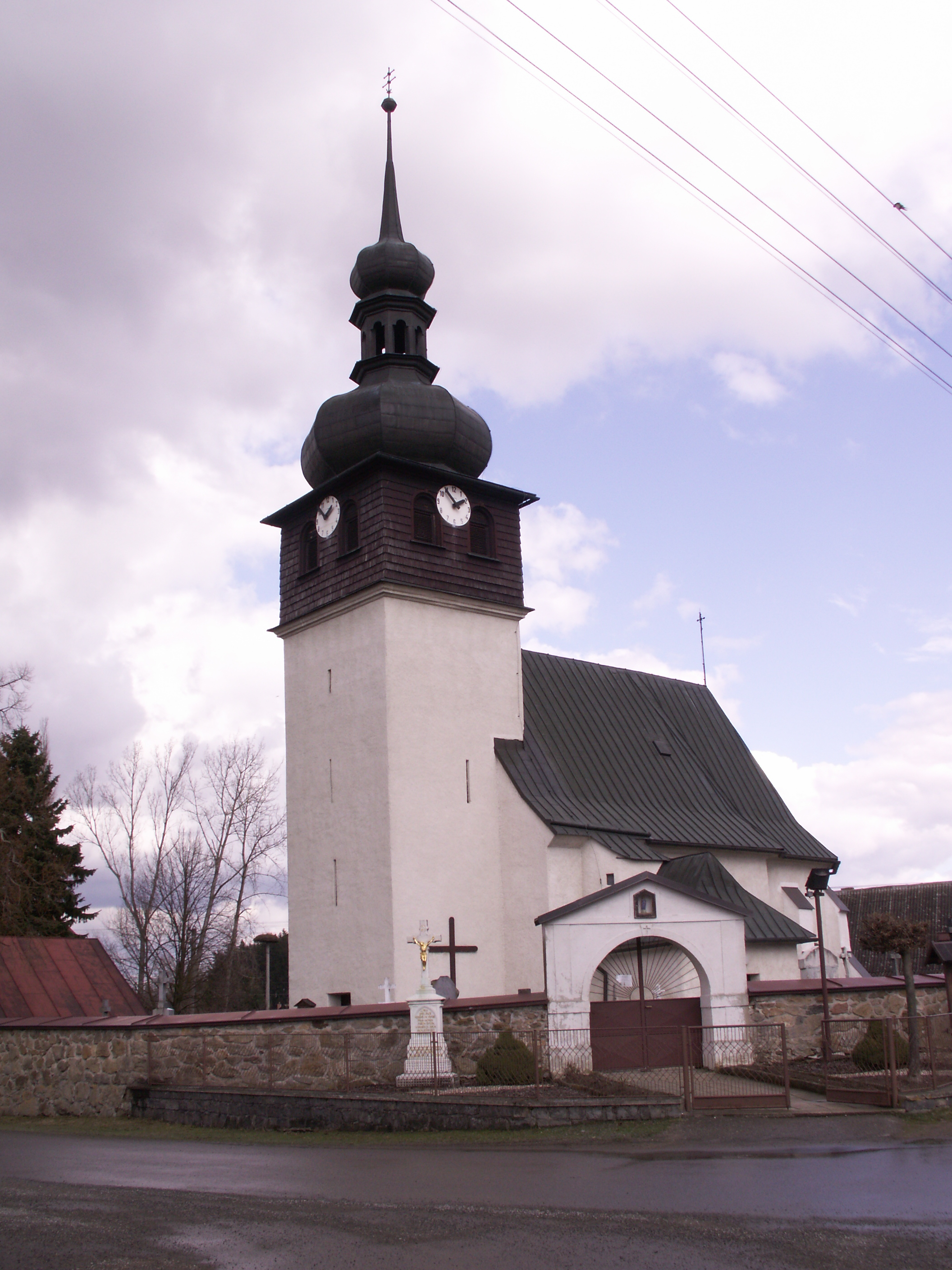 kostel sv. Bartoloměje, Bobrůvka, okres Žďár nad Sázavou